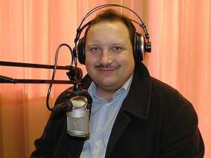 Thomas Stotko, członek landtagu w Düsseldorfie (Foto: Newsdesigner)